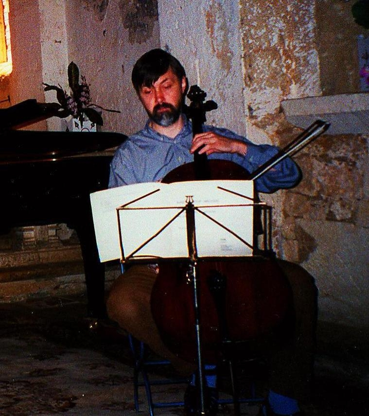 Ivan Monighetti, cellist, at a rehearsal